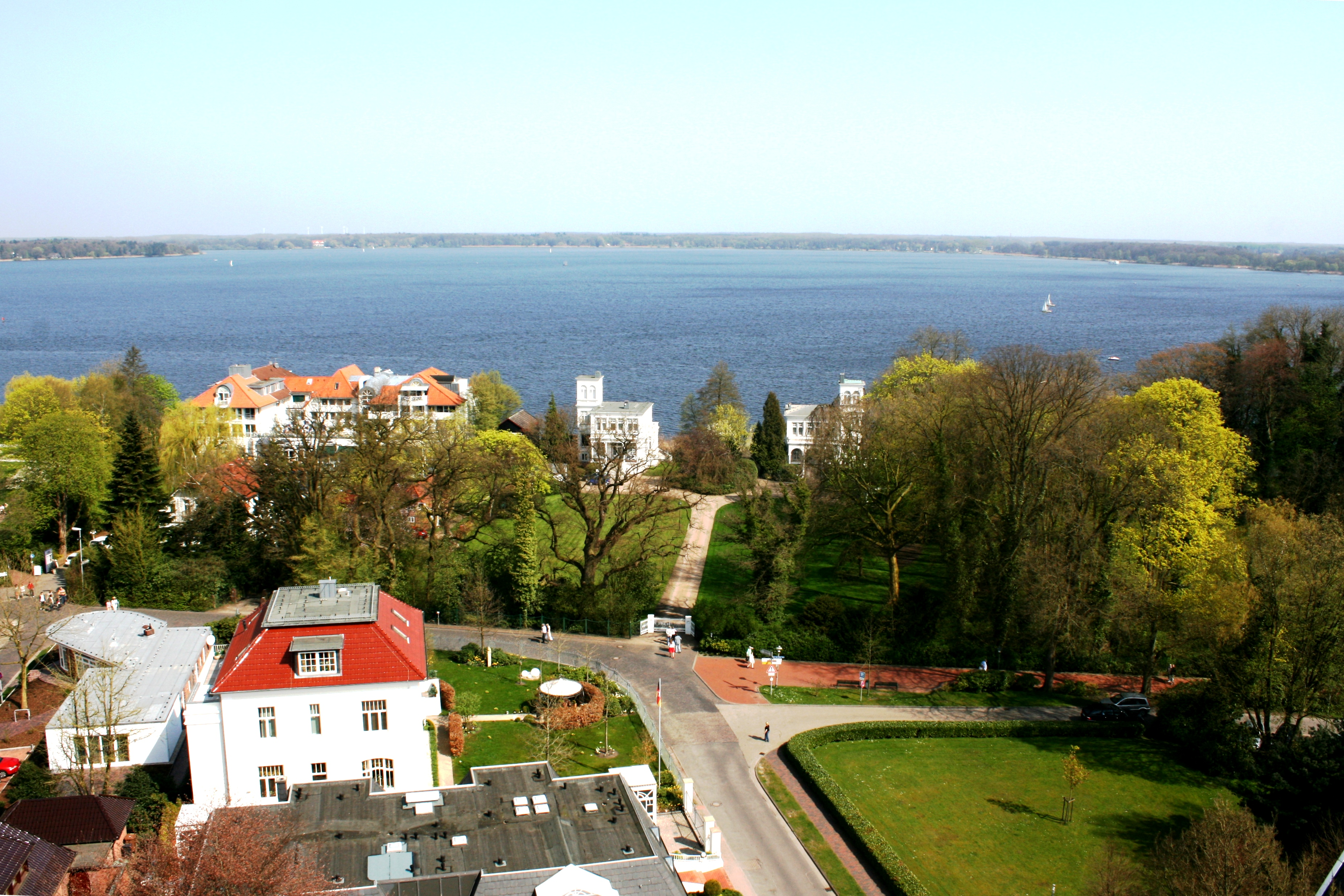 Blick von Bad Zwischenahn aus über das Zwischenahner Meer